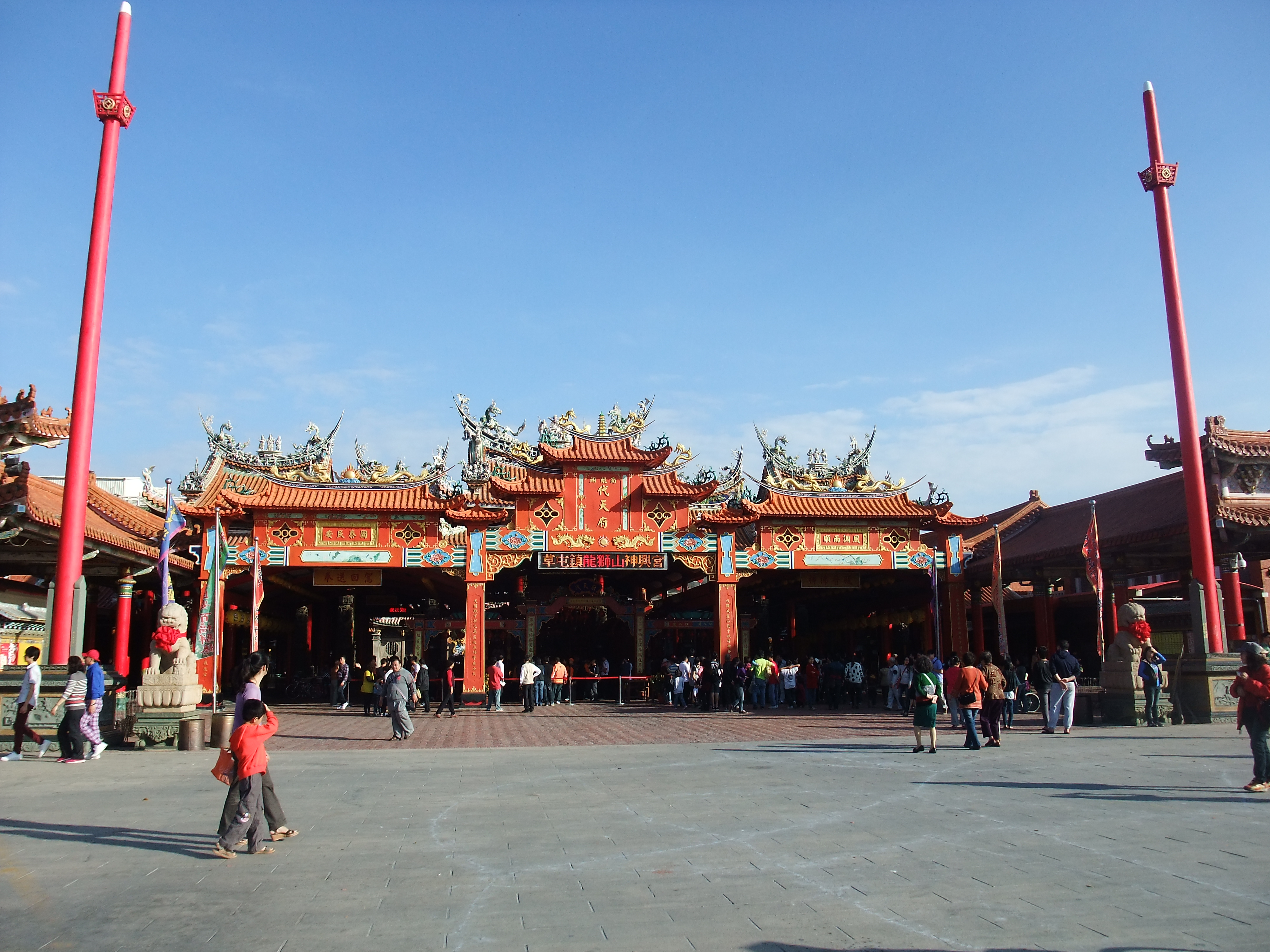 中文（台灣）: 南鯤鯓代天府廟門